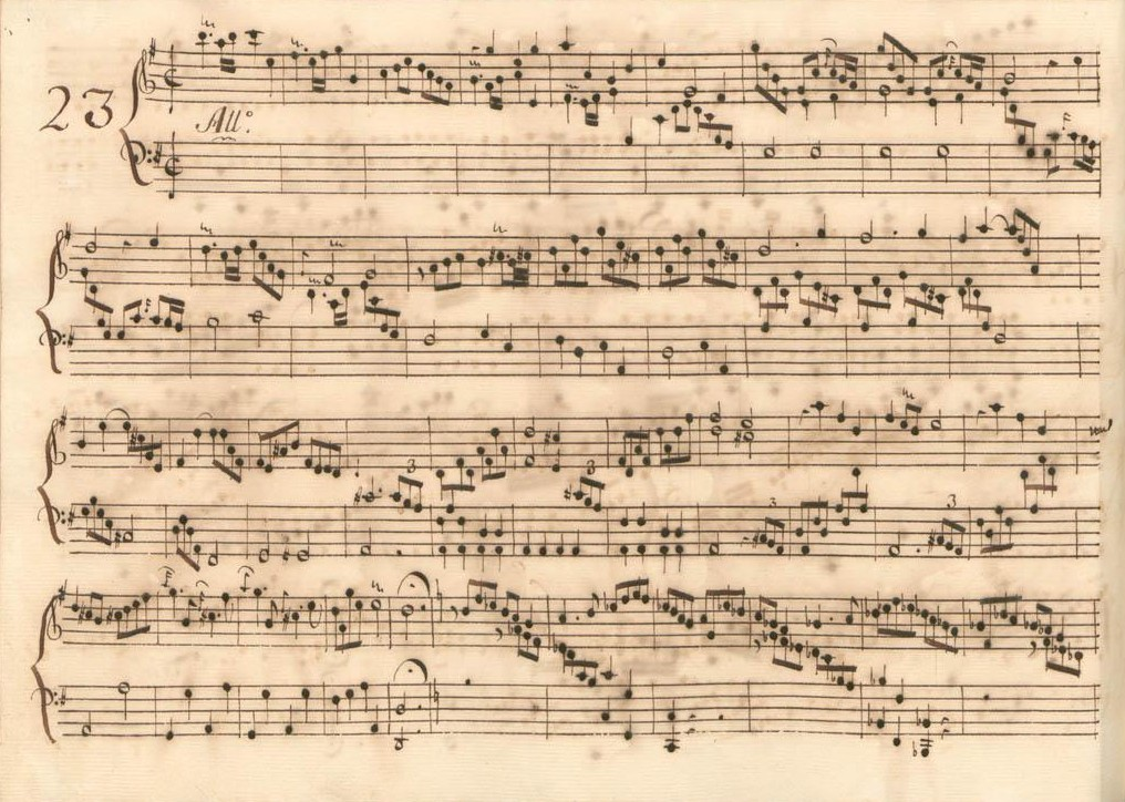 La sonate K. 240, telle qu'elle se présente dans le manuscrit de Parme, volume V no. 23.